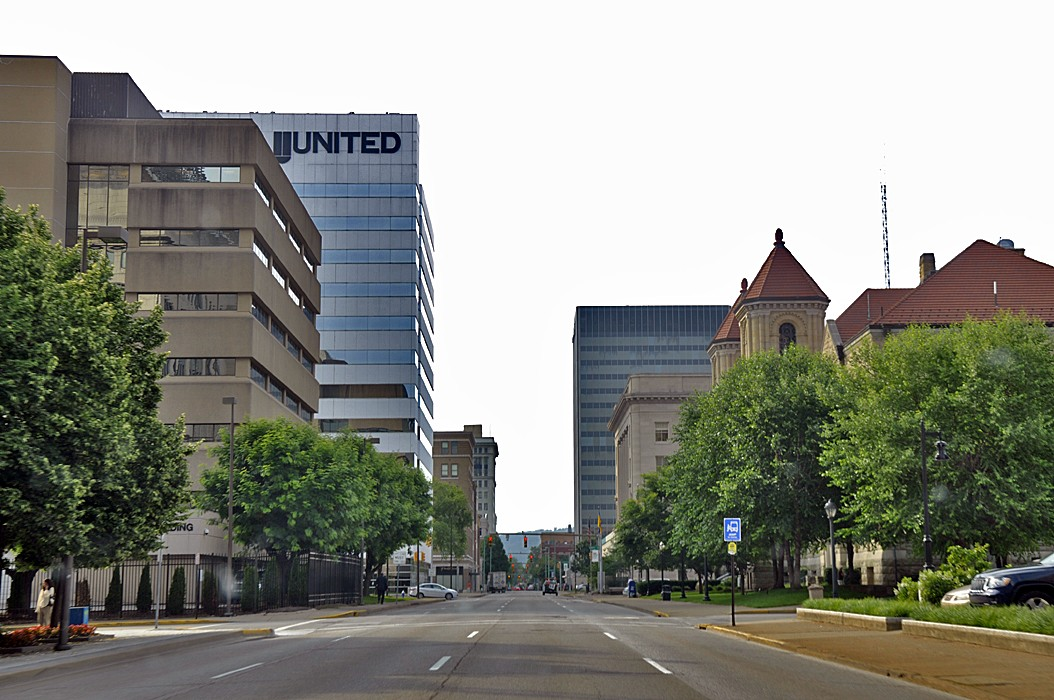 Strasse im Zentrum von Charleston, Hauptstadt von West Virginia